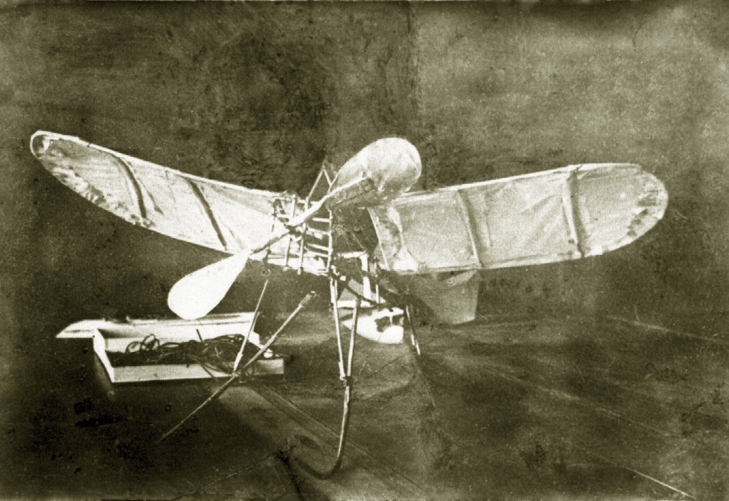 Действующая модель самолета Николая Фаусека. Гимназия К. Мая